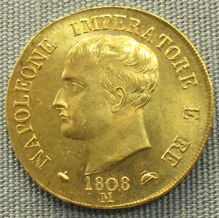 Italia, 40 lire di napoleone imperatore, 1808